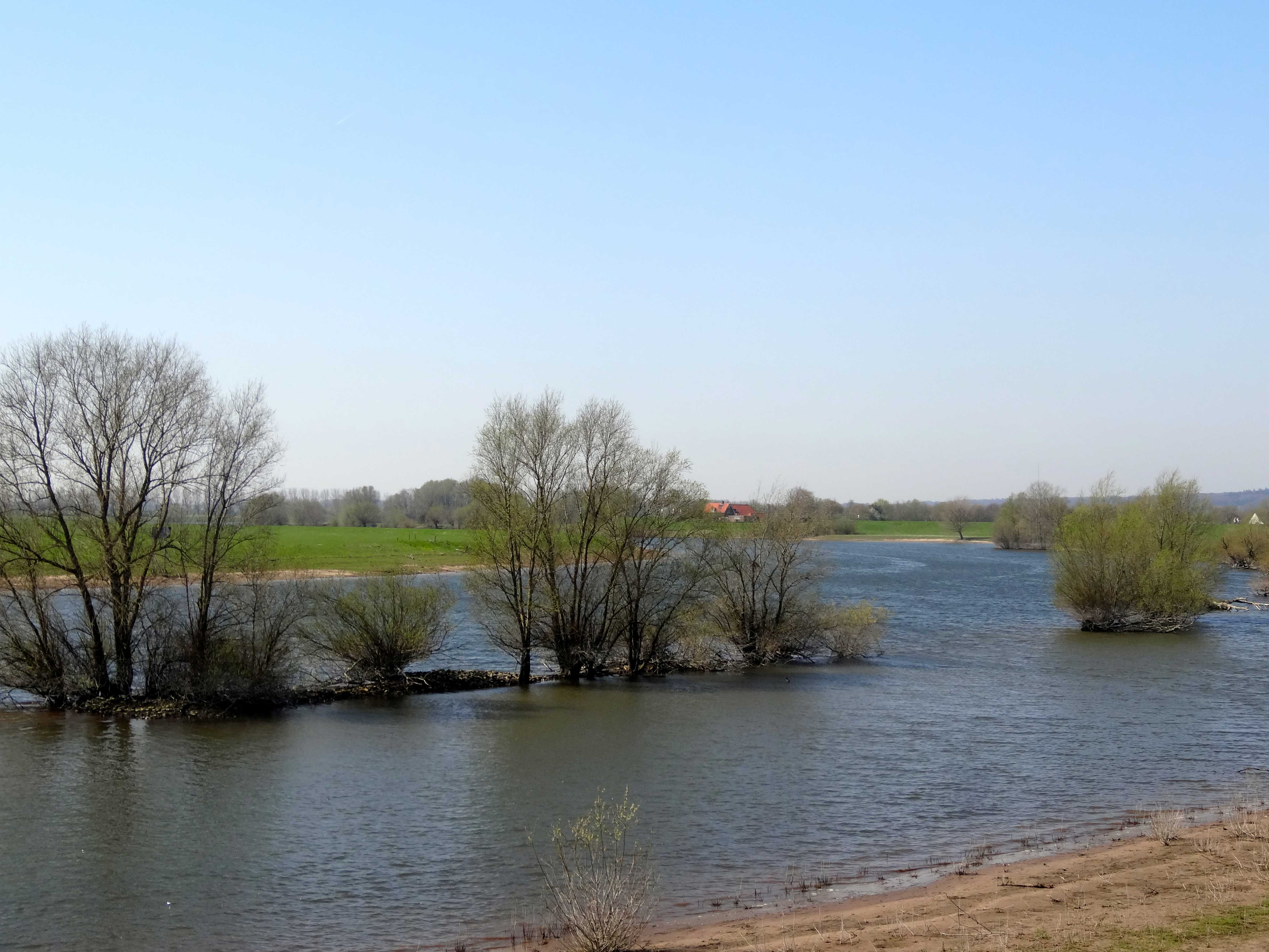 Het Zwarte Schaar (IJssel) ter hoogte van de noordelijker gelegen plaats Rha. Aan de overzijde van het water de Fraterwaard